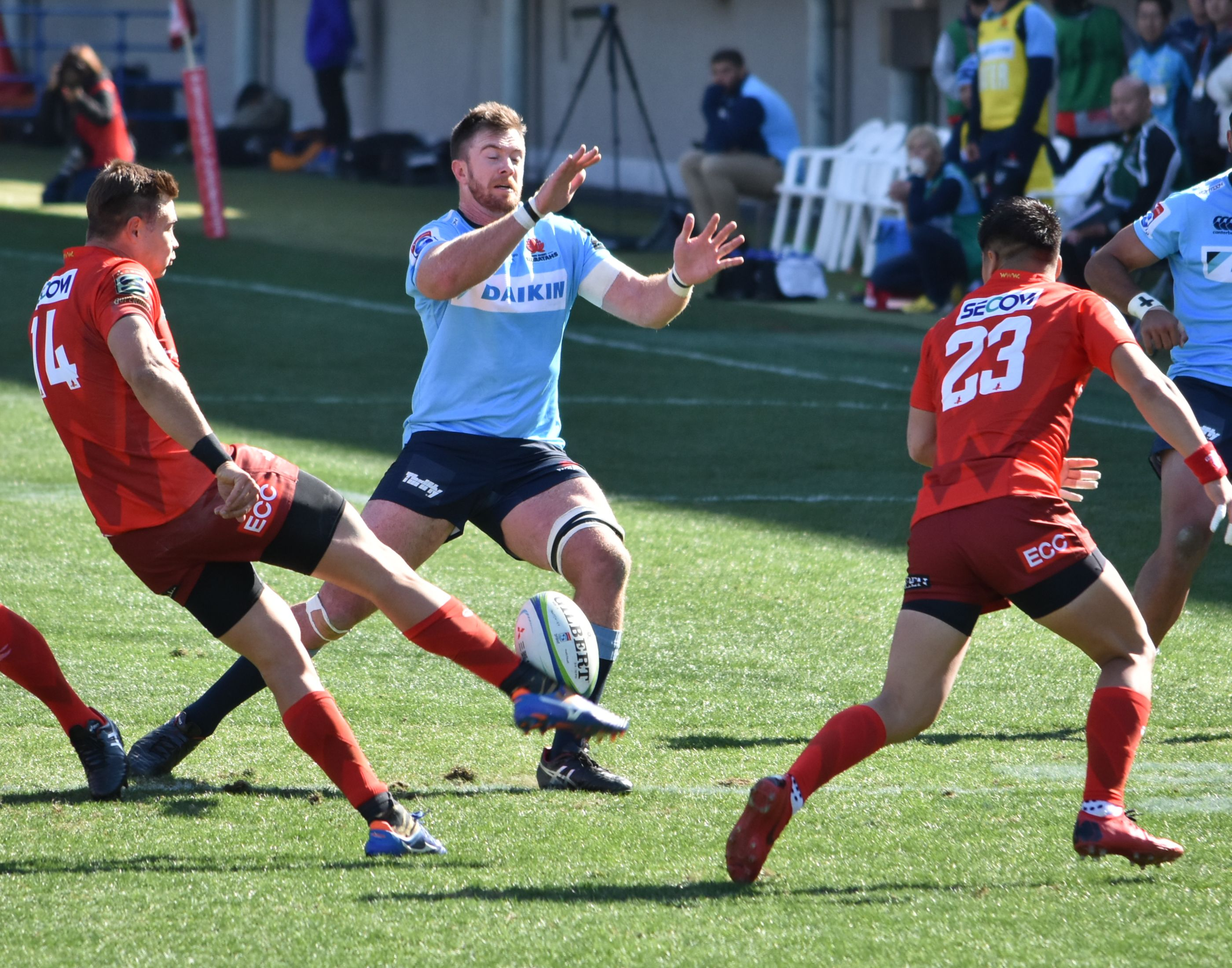 ゲラード・ファンデンヒーファー。秩父宮ラグビー場にて。 Nikon D3400